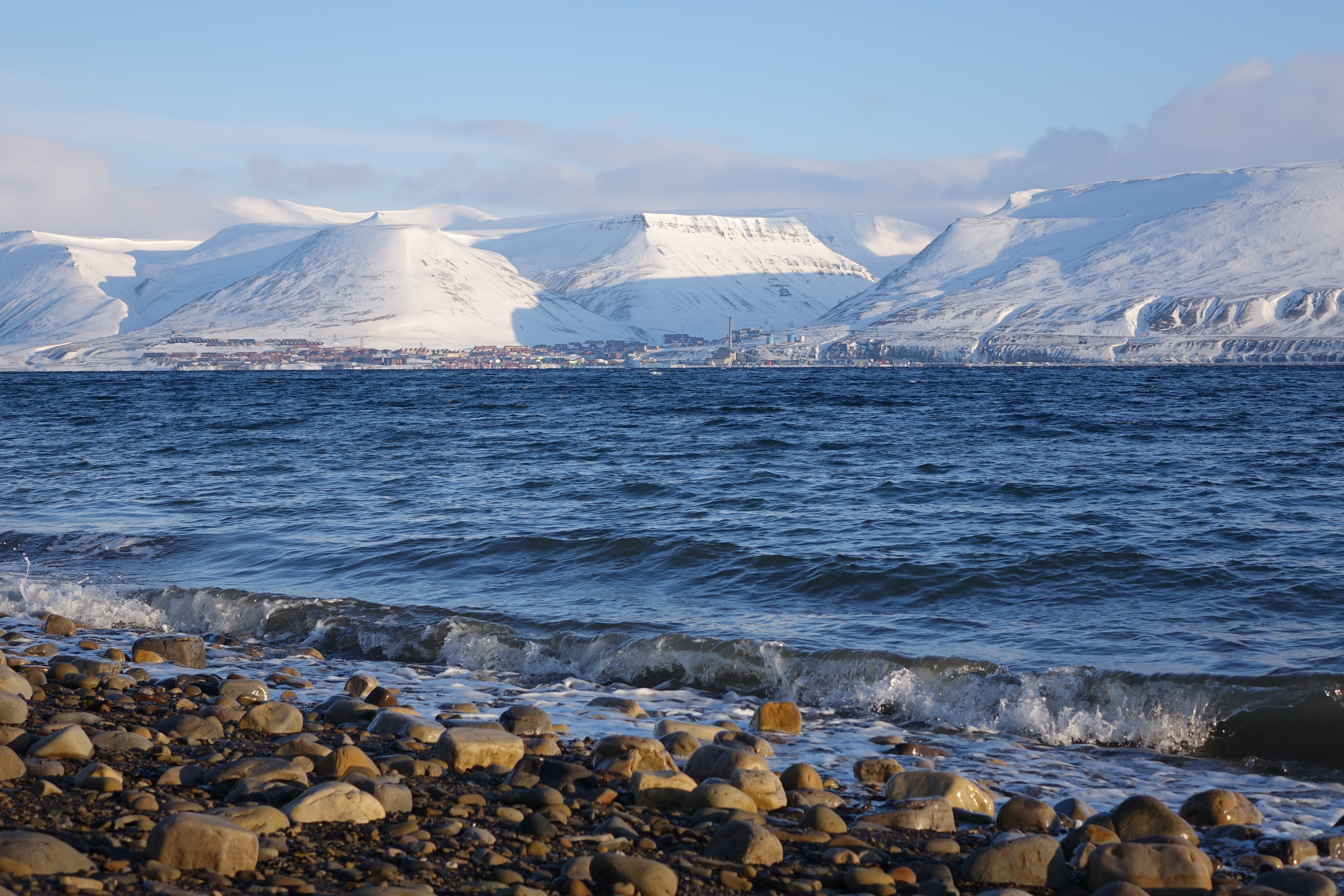 Longyearbyen, vista da cidade a partir do outro lado da baía